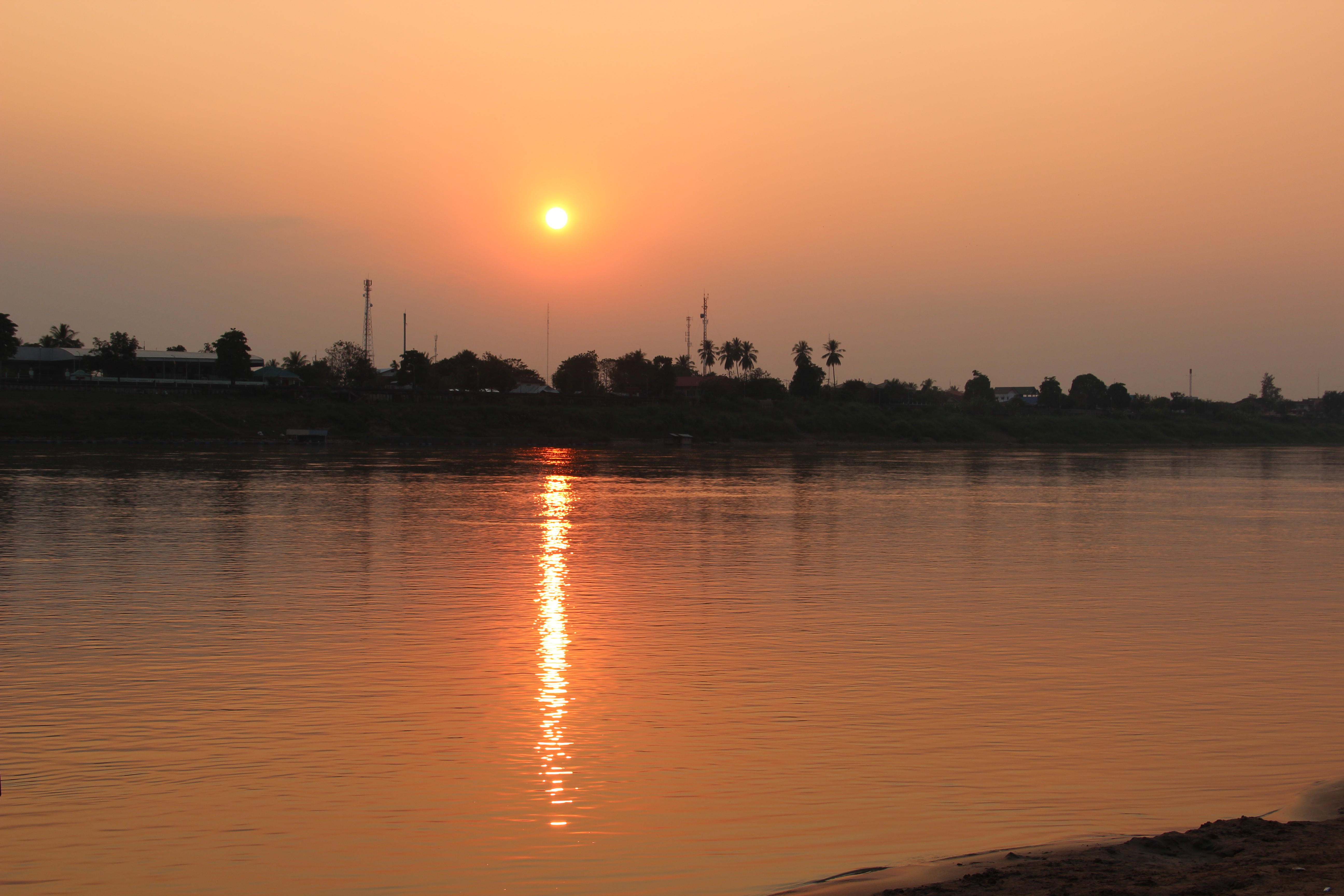 Coucher de soleil sur le Mékong, vu depuis Vientiane (Laos). La rive opposée est en Thaïlande.